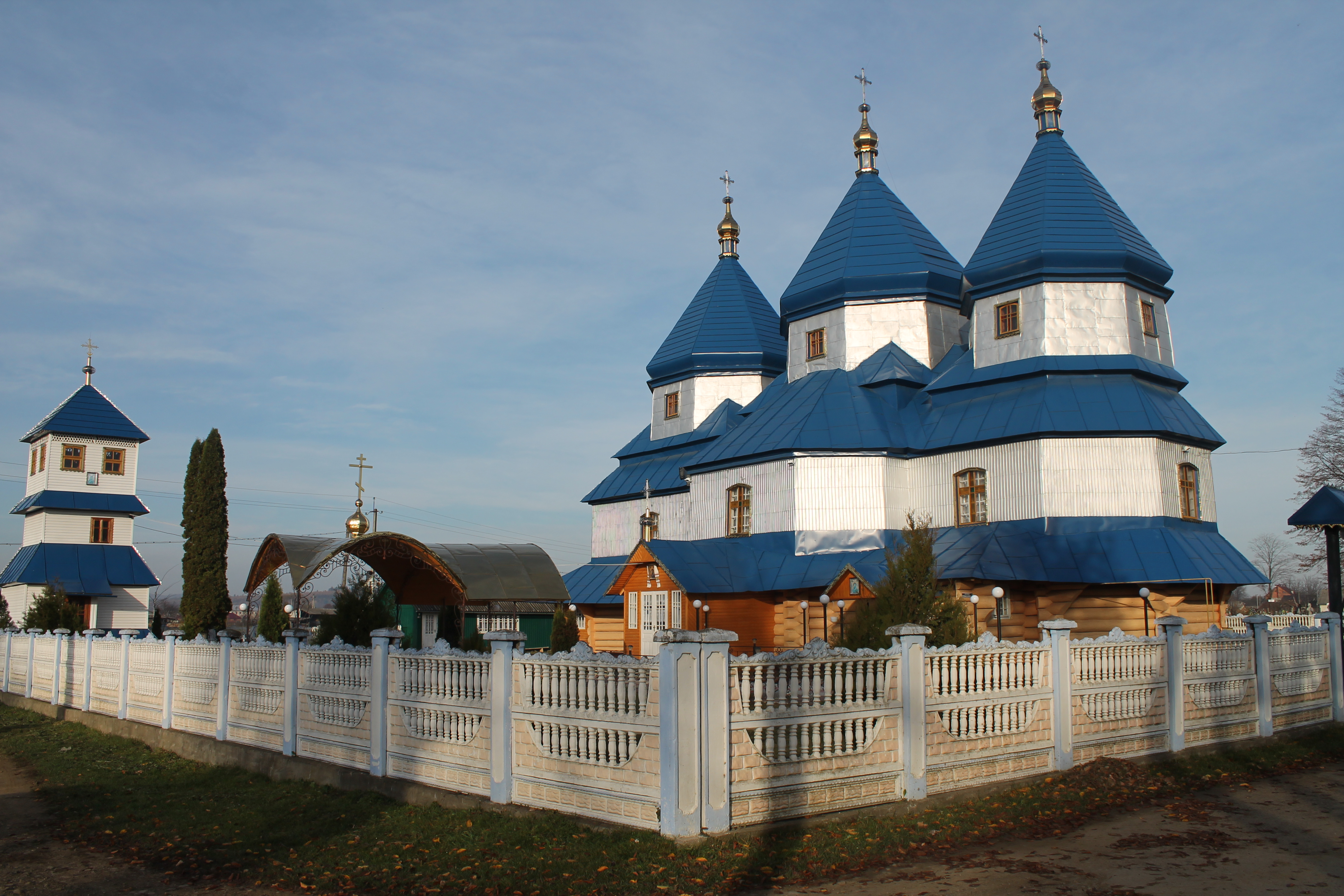 Церква Параскеви та дзвіниця (дер.), с. Луківці